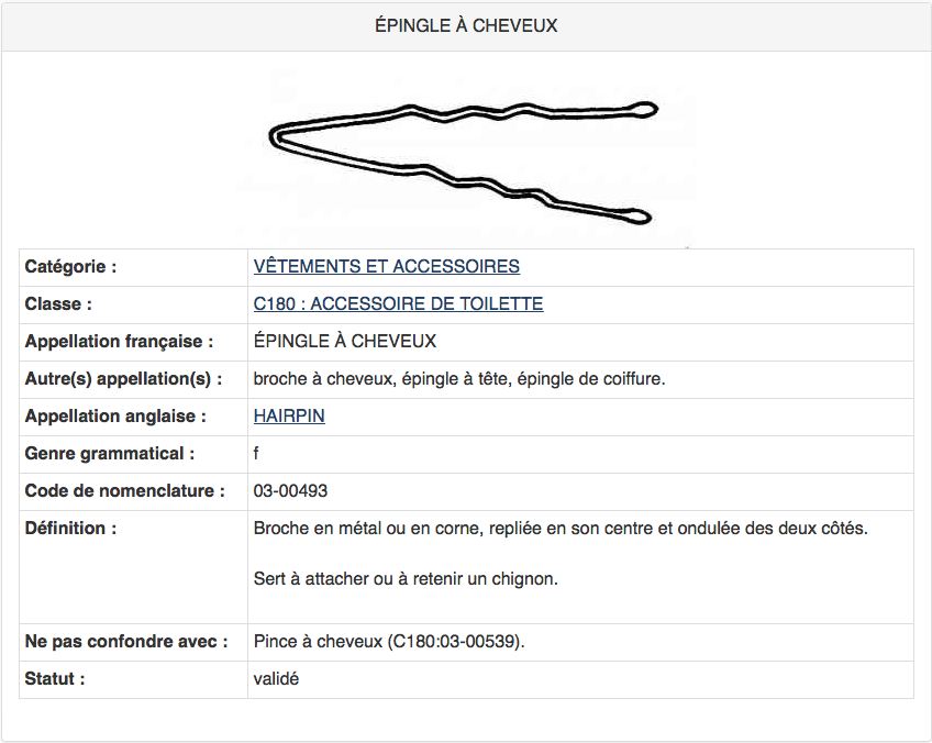 Capture d'écran de page de l'objet sur le web de DDV de Parcs